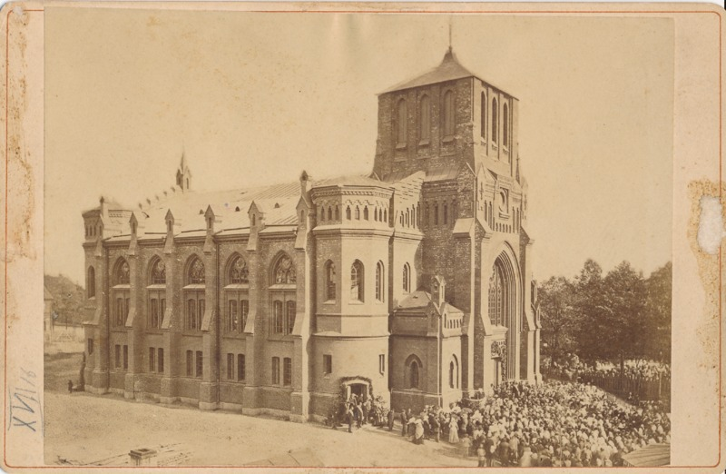 Peetri kirik; sissepühitsemine. Tartu, 1884